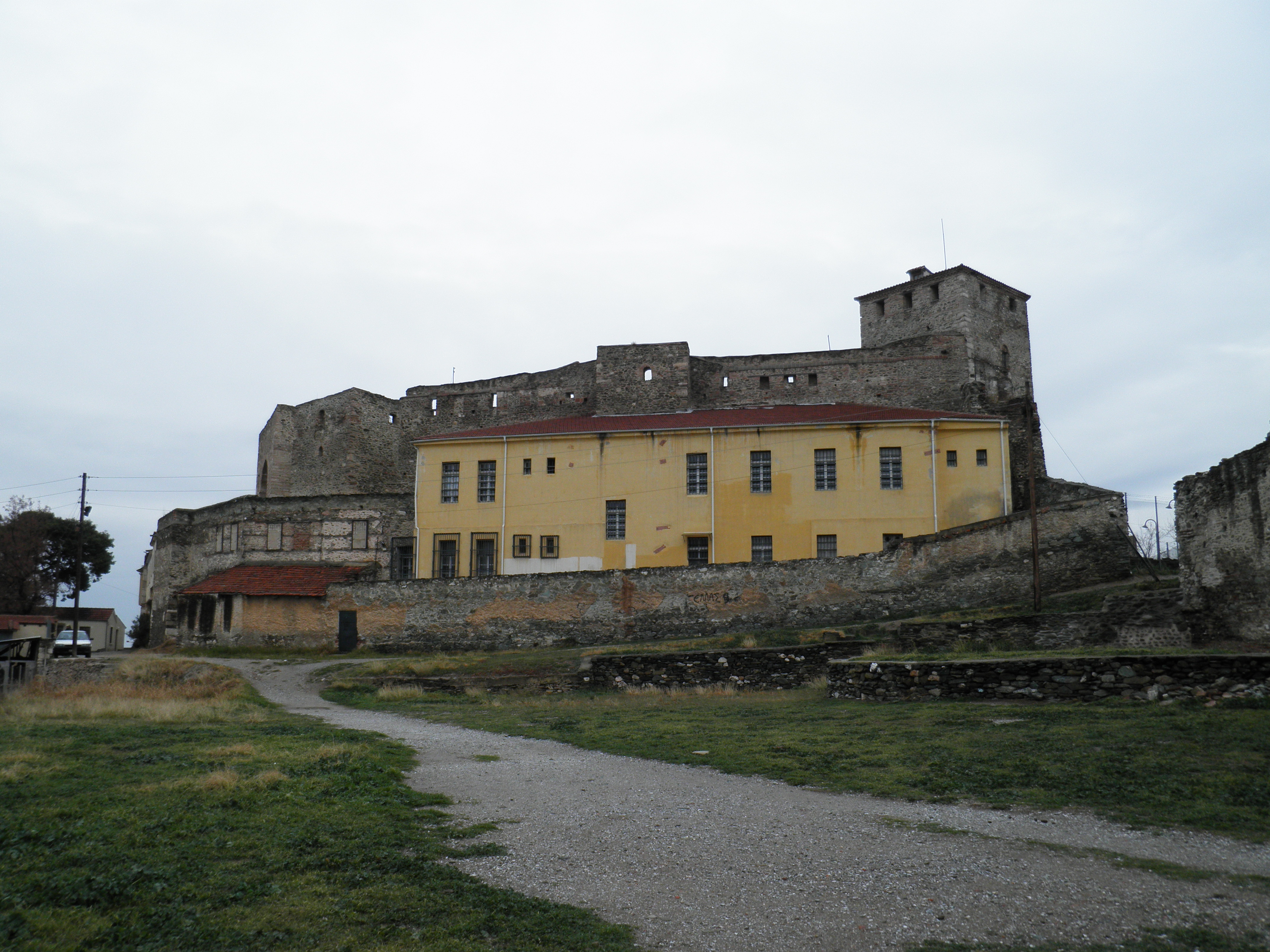 Eptapirgio